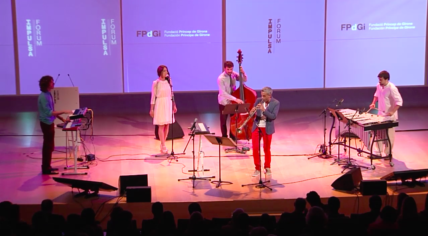 Tenora 2.0. Fòrum IMPULSA 2012. Xavi Lloses, Rosa Pou, Joan Motera, Adrià Bauzó i Andreu Vilar i Juanola.